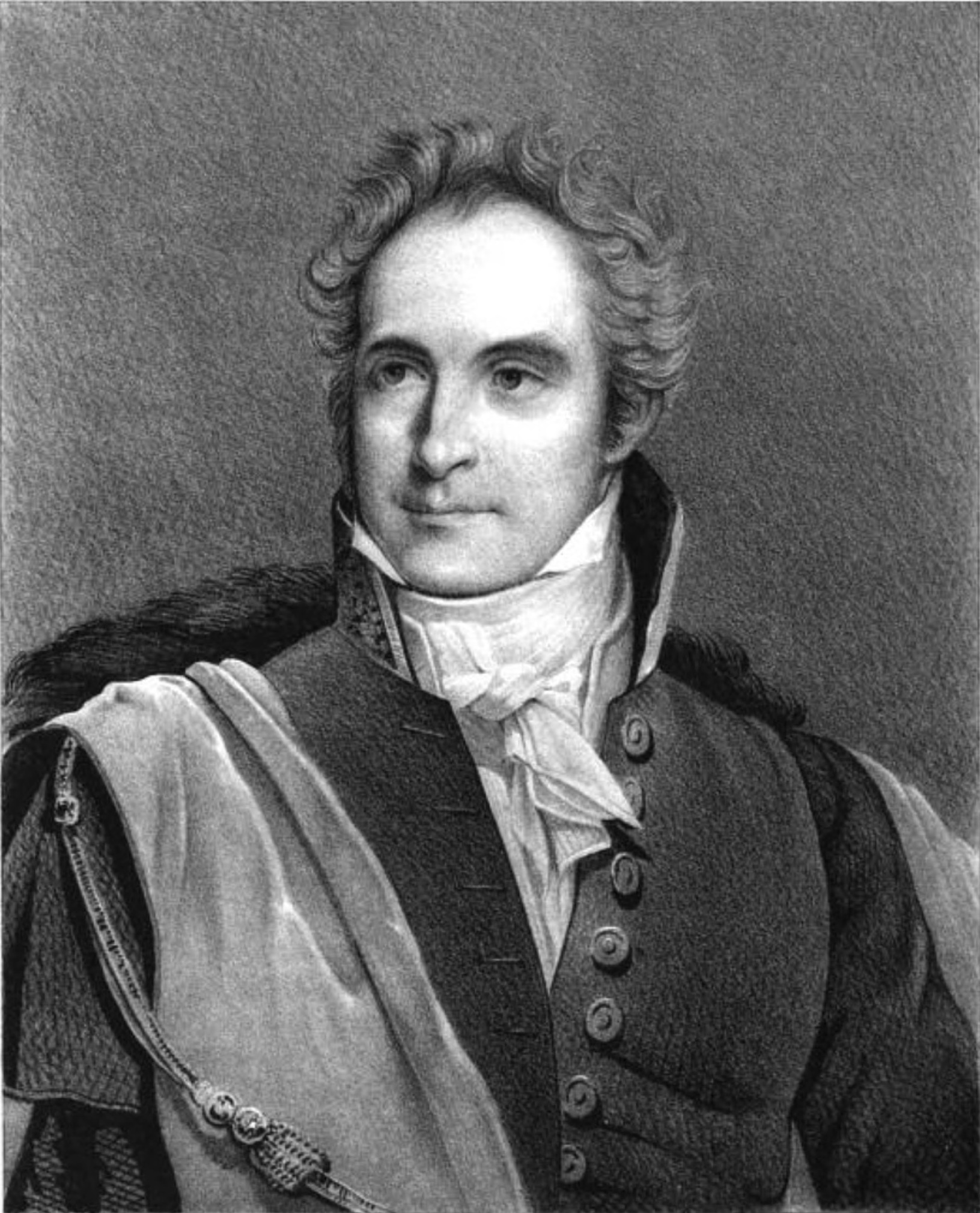 Album du Dauphiné - tome III, litographie de Casimir Périer